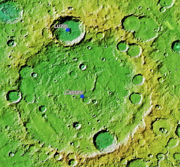 Cráter marciano Cassini. (Imagen IAU/USGS/Goddard/A SU/USGS)